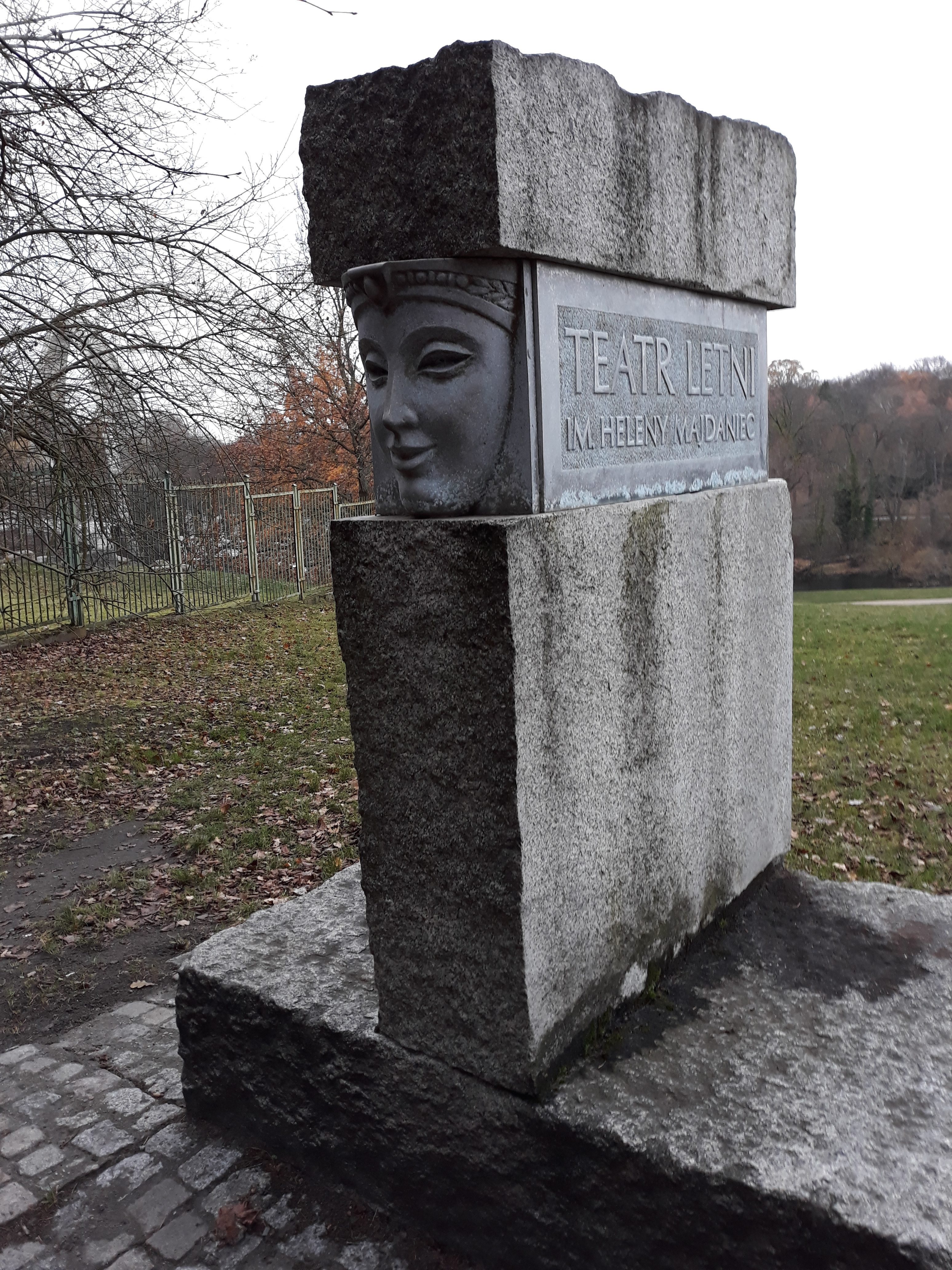 Upamiętnienie Heleny Majdaniec w Teatrze Letnim w Szczecinie